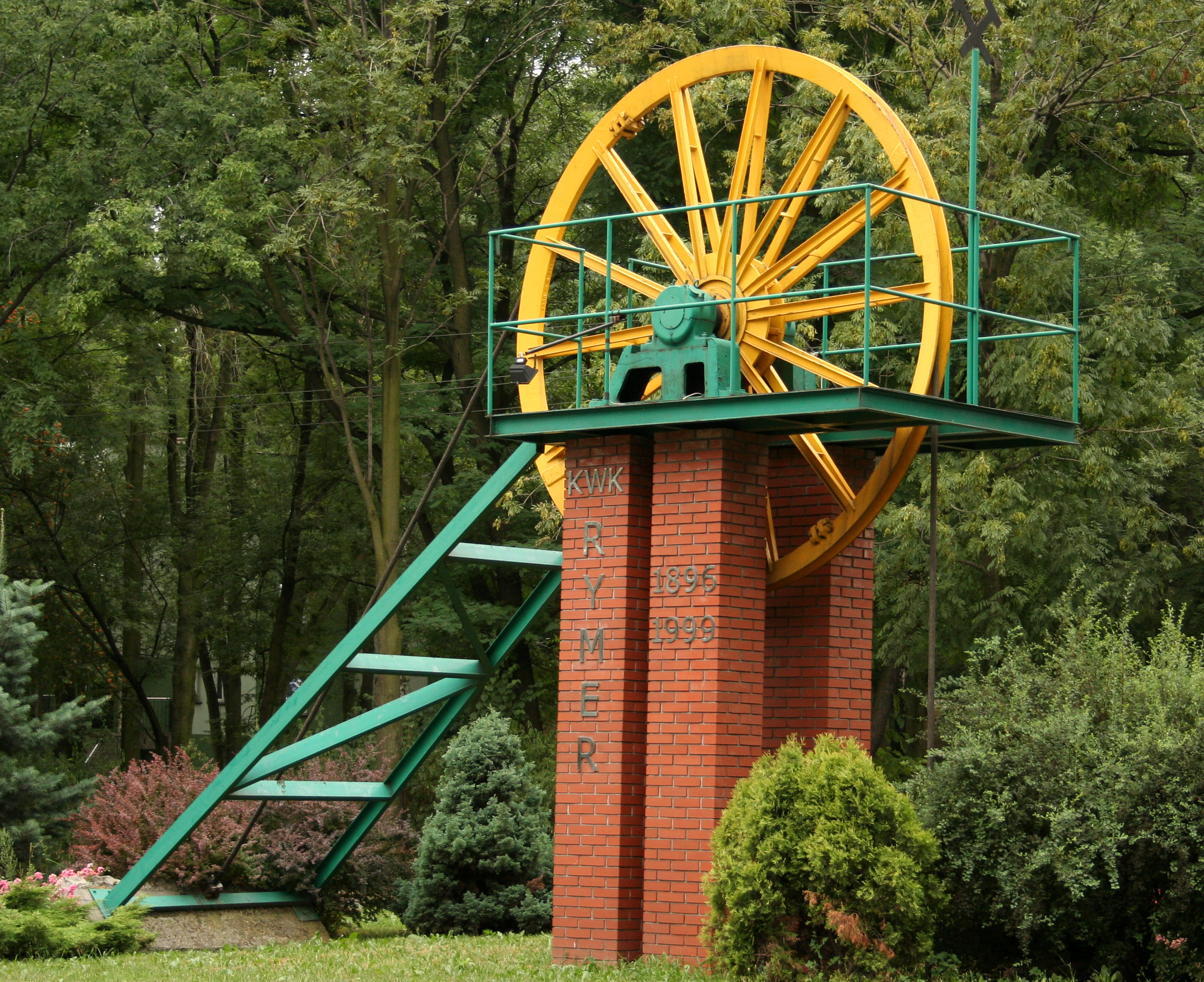 rymer_pomnik